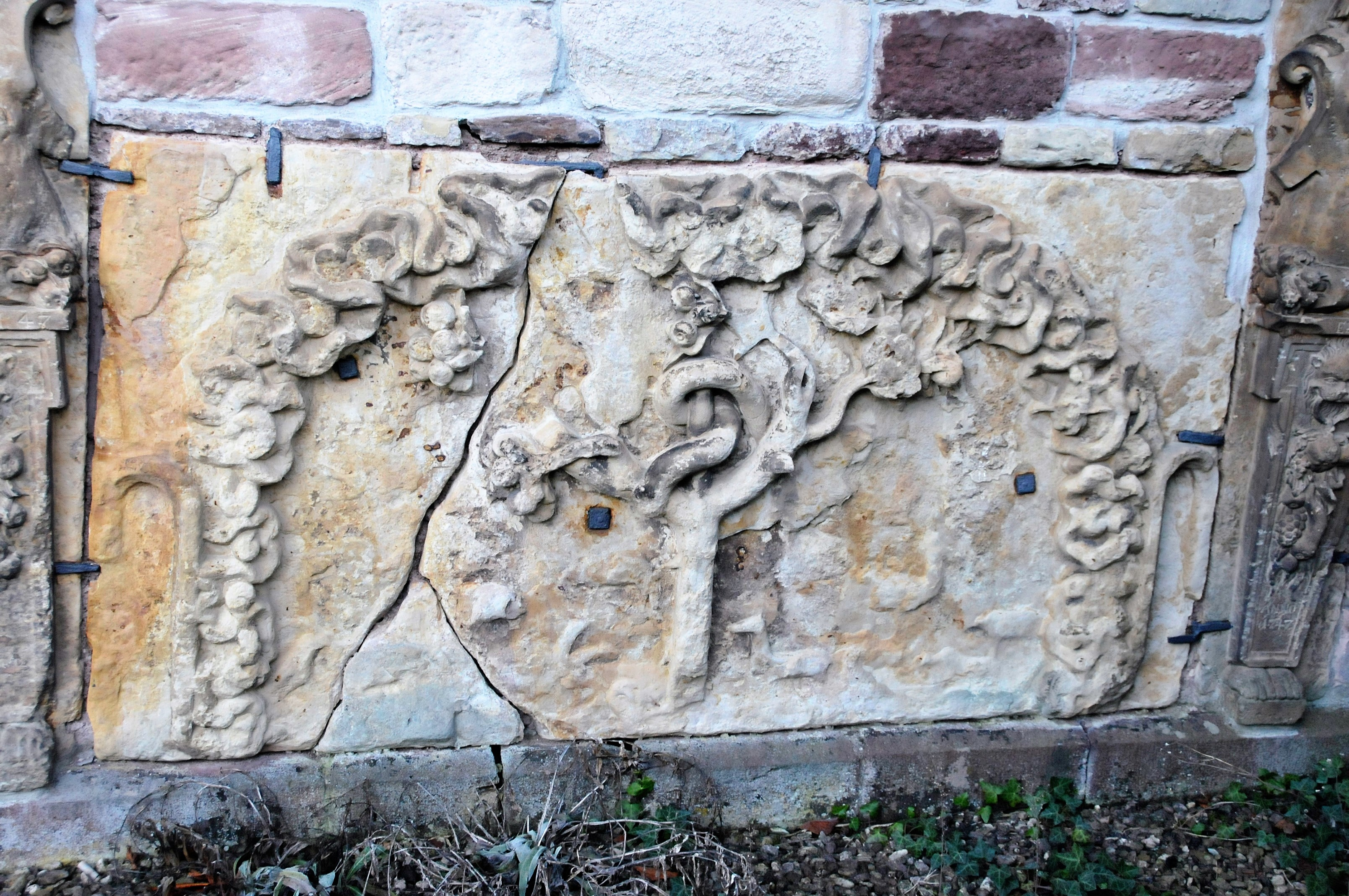 Engelsbach, einer von zwei Paradiessteinen